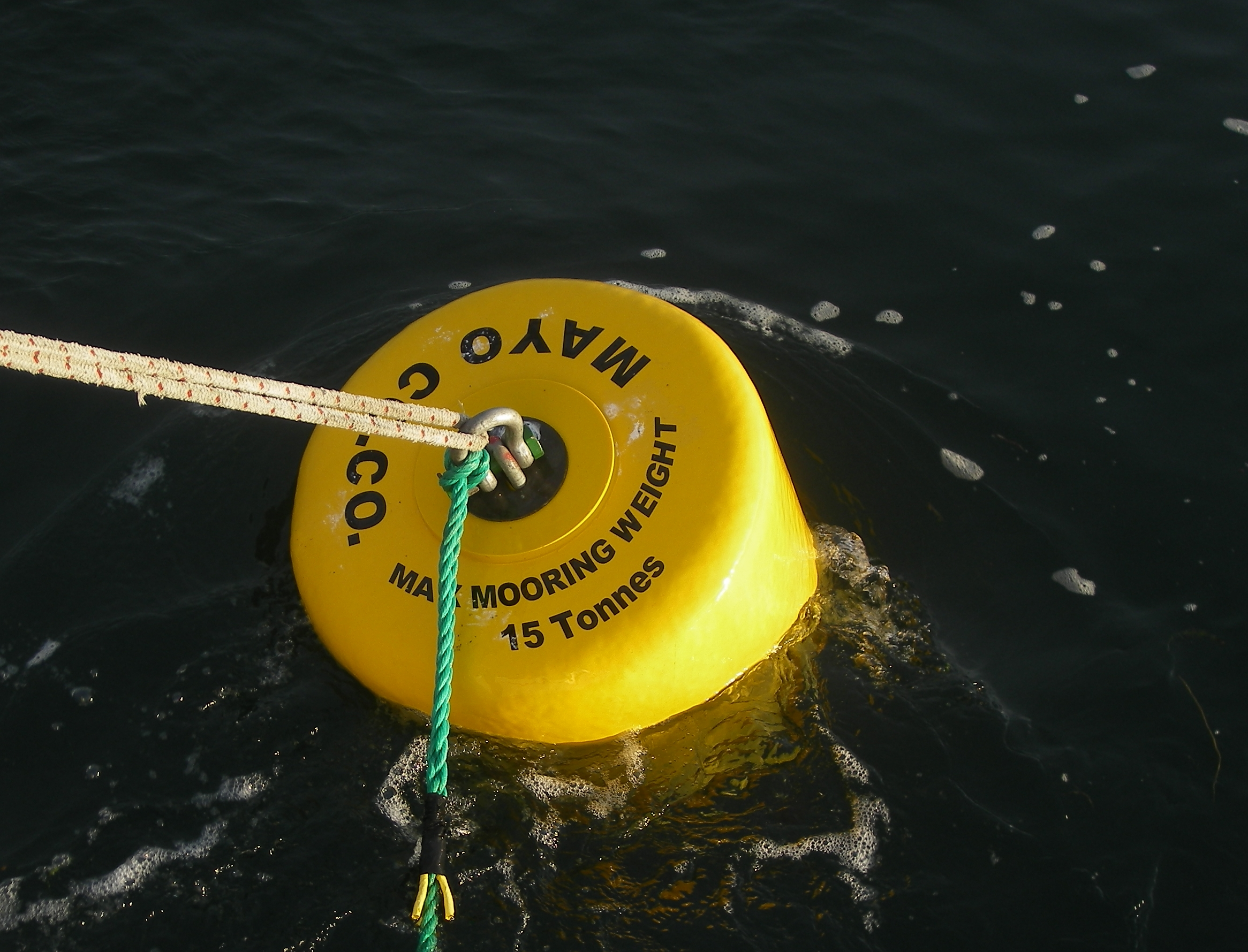 une tonne en Irlande, en 2008